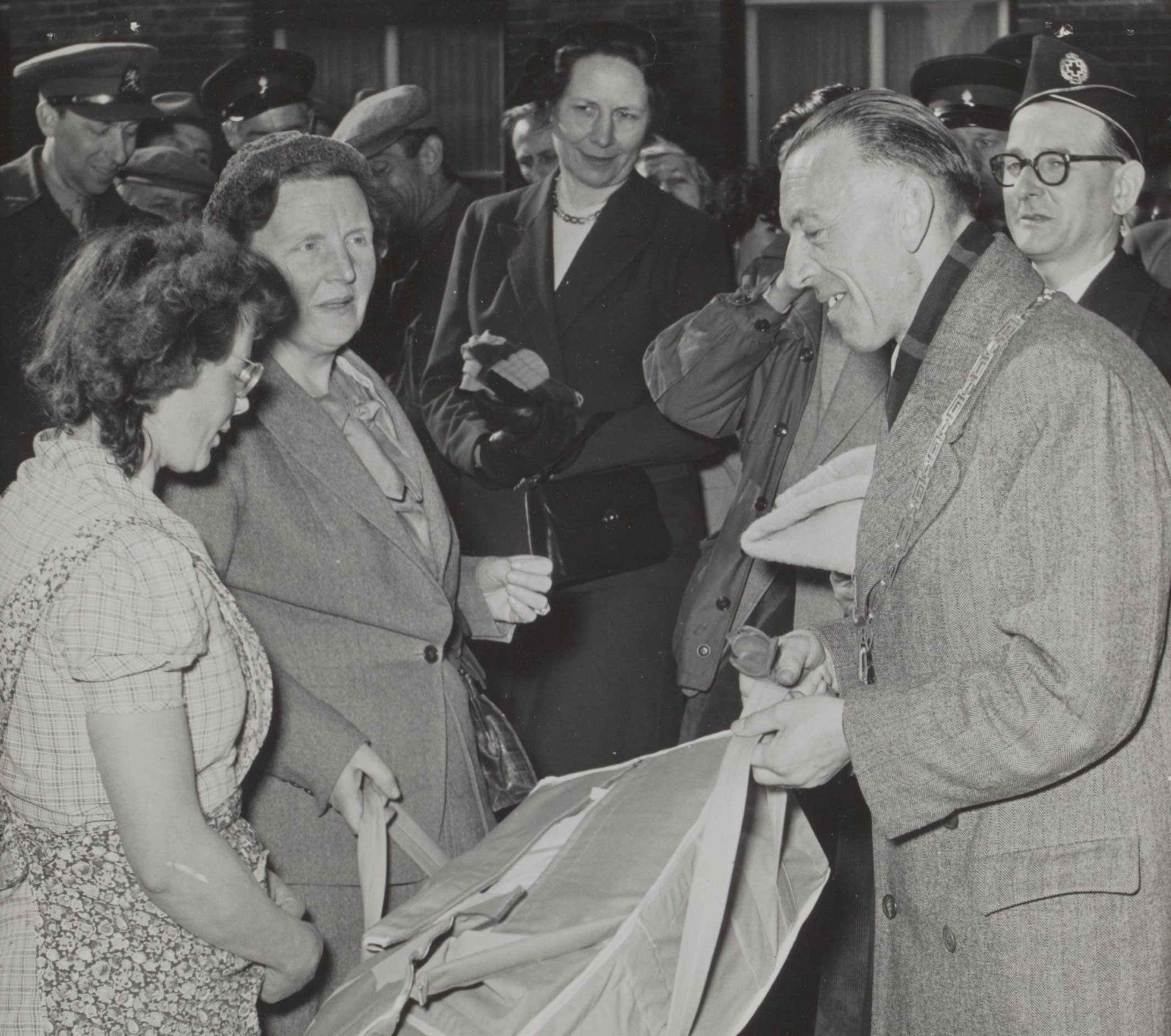 Bezoek koningin Juliana aan Nieuw- Vossemeer na de Watersnood van 1953 - rechts burgemeester Janssens van Nieuw-Vossemeer (uitsnede uit het origineel)